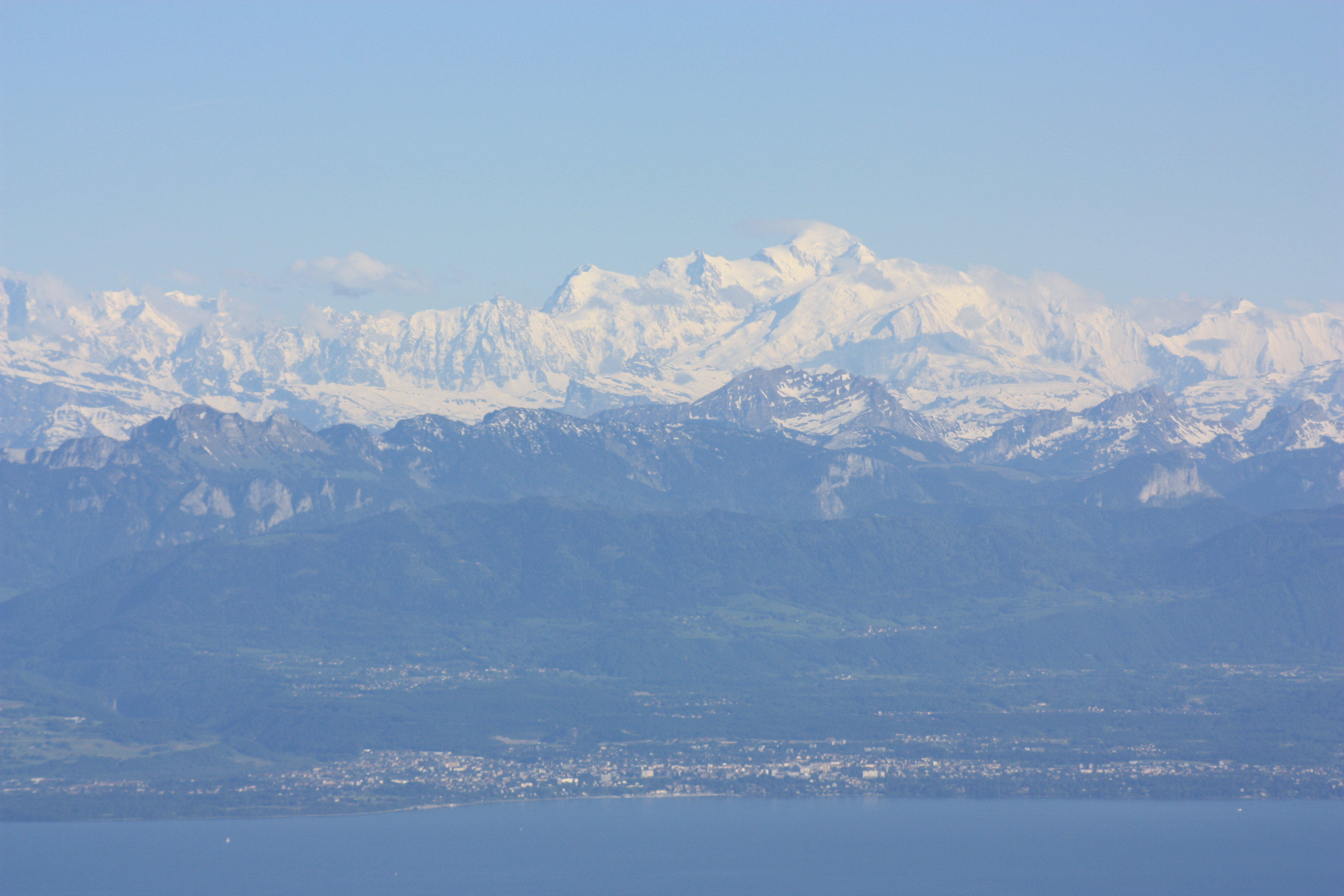 Vue sur sur Thonon-les-Bains et le Mont-Blanc depuis le Mont Tendre en Suisse